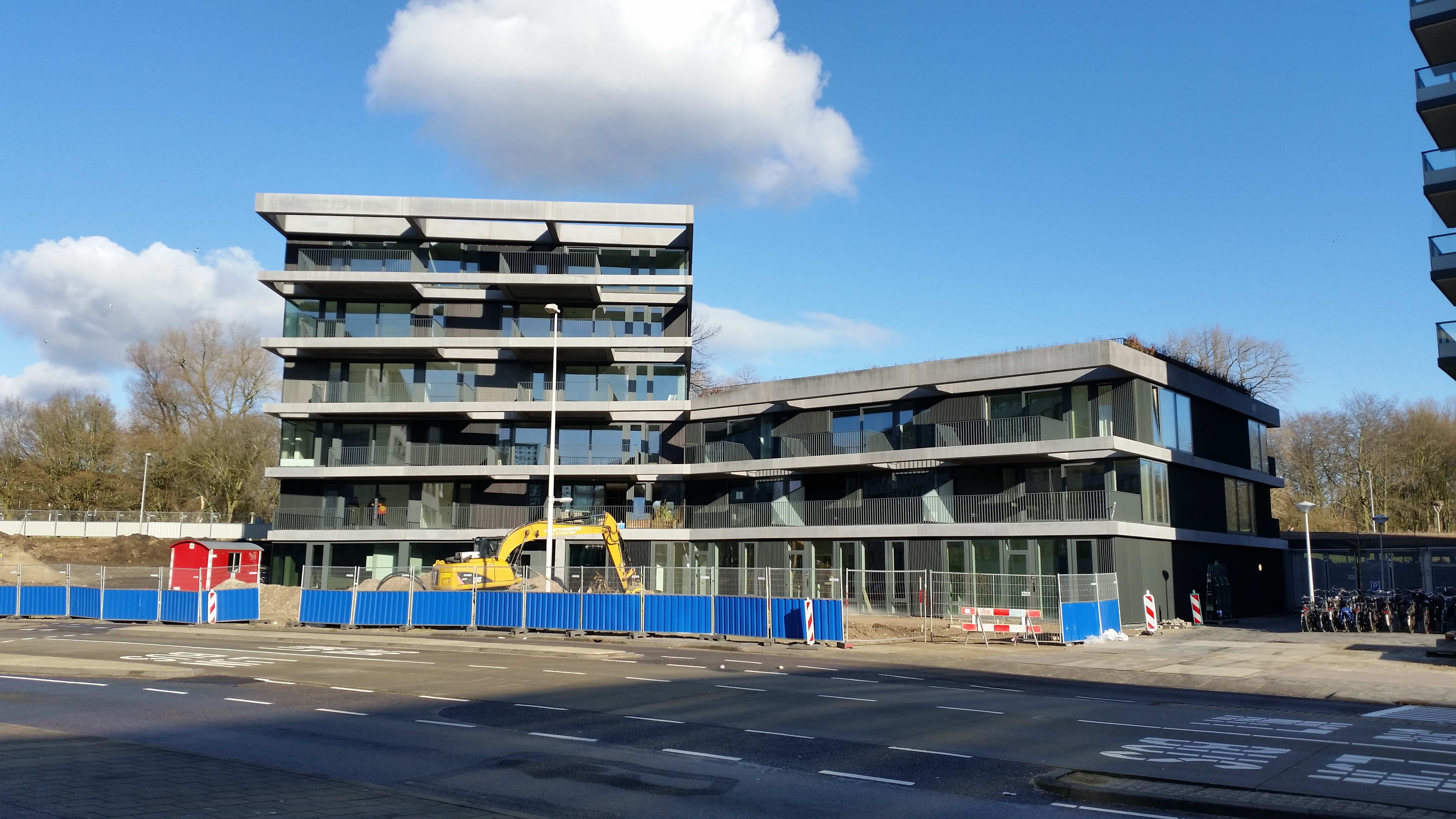 CPO in opbouw aan de Carolina MacGillavrylaan, Amsterdam